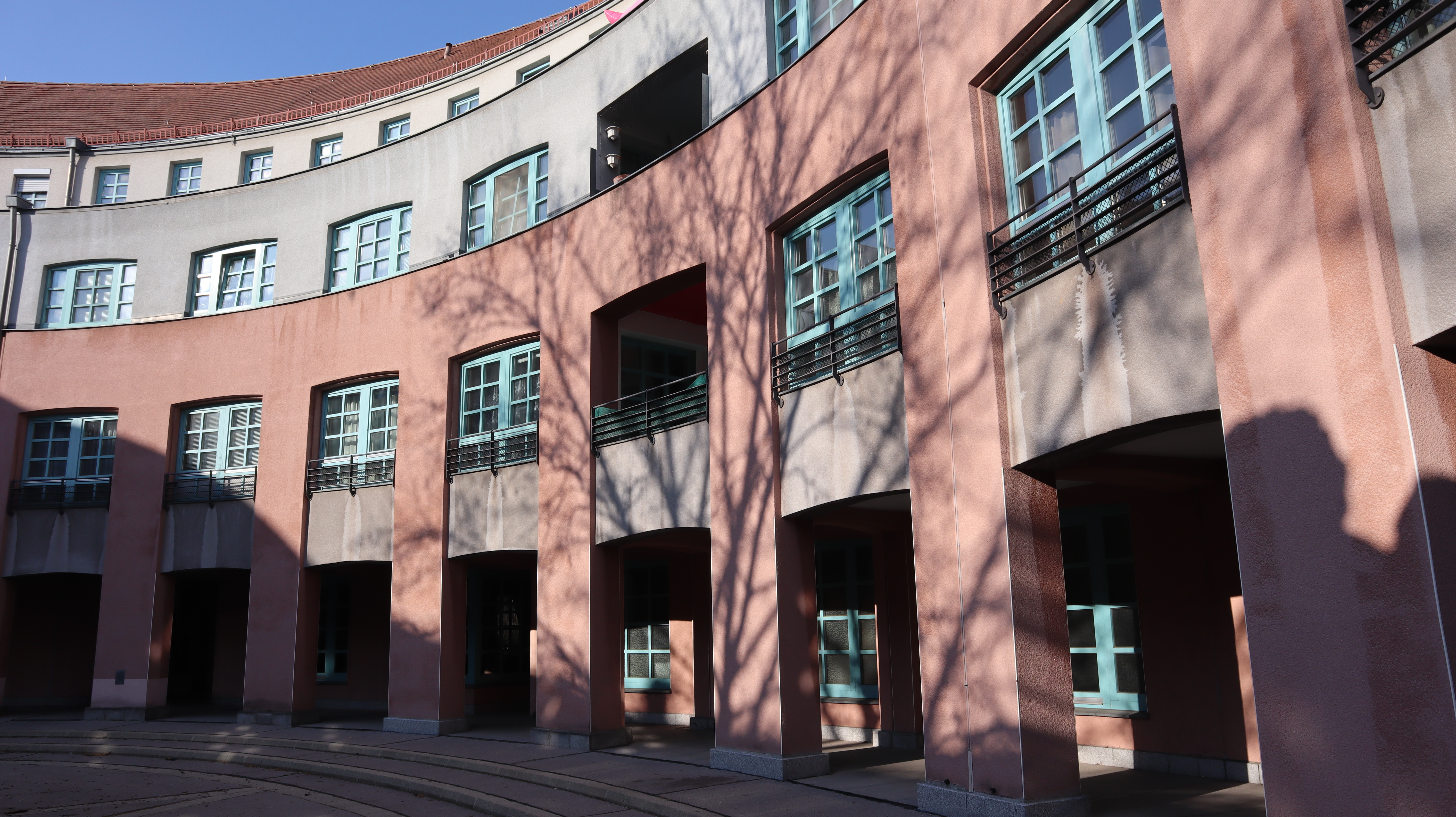 Kommunaler postmoderner Wohnbau, Postmoderne Anlage von Krier, Wachberger, Gebhart